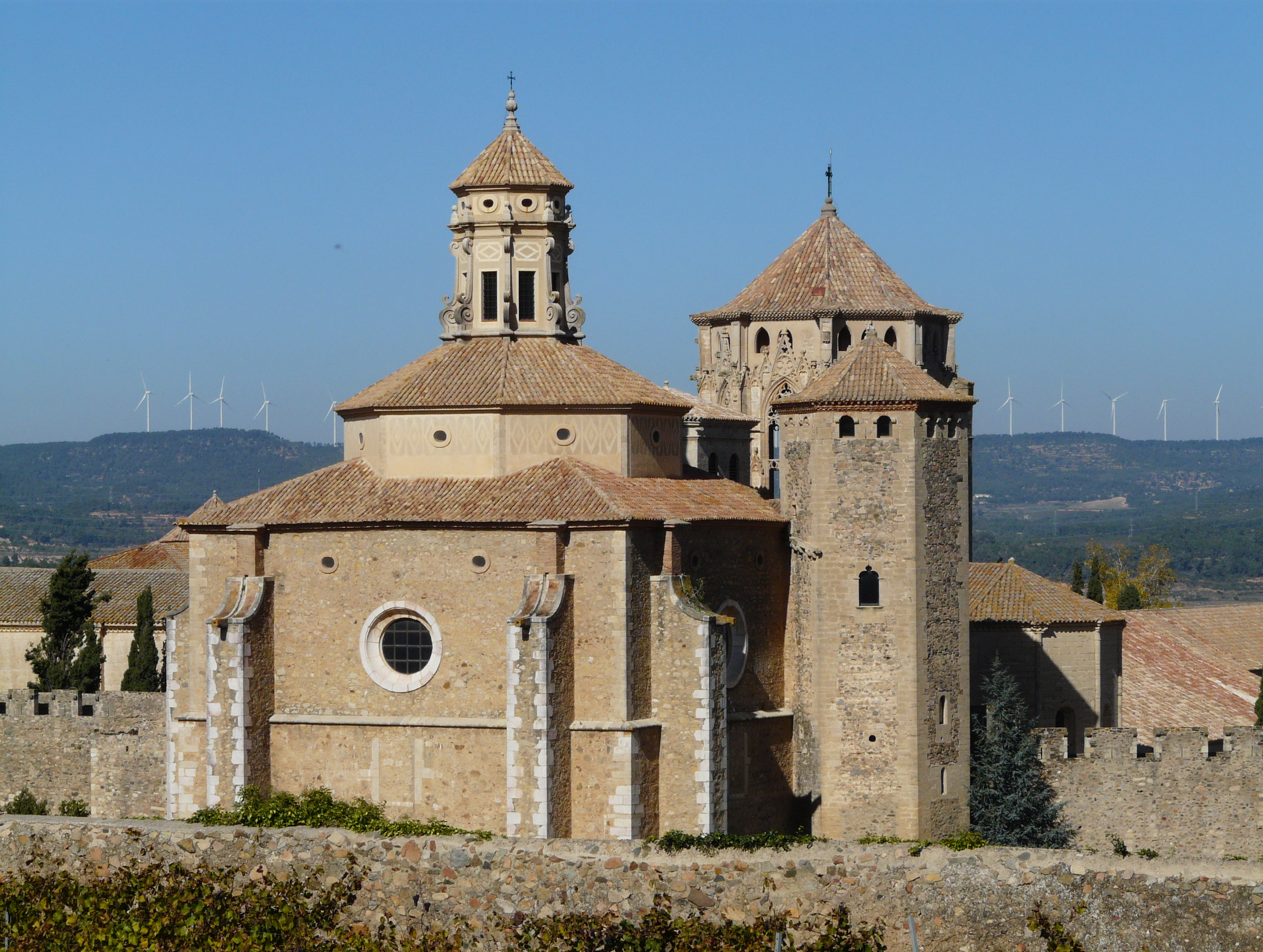 Reial Monestir de Poblet, Spain